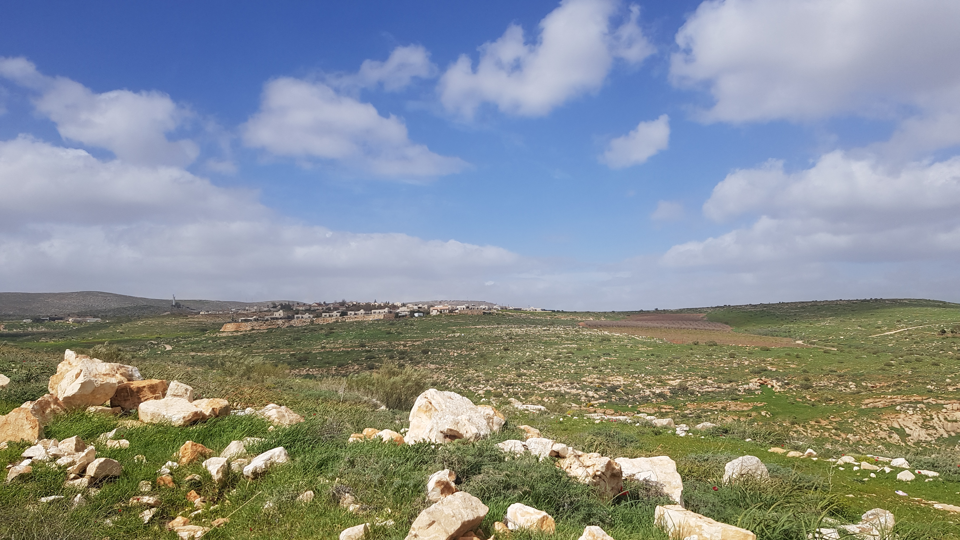 השכונה המזרחית של כוכב השחר